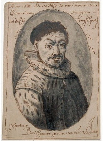 Tekening van Balthasar Gerards, borstbeeld in ovaal, in de hoeken en beneden het opschrift: 'Anno 1584 : den 10 july is van desen : den Prince van Orangien tot Delft doorschoote. Geheeten Balthasar Geeraerts out 26 jaer'. Op 10 juli 1584 klonk op de trap het schot van Balthasar Geeraerts. Zoals de Staten van Holland het beschreven; 'Nae noene omtrent twee uyren is syne Excellencie van de Tafel tredende op de eerste niewe Trappe in syn Hof binnen Delf, doorschoten....'. Met één schot vuurde Balthasar Geeraerts drie kogels af, waarvan er twee het lichaam van de prins weer verlieten. Zij lieten hun sporen na in de muur. Deze zijn nog steeds te zien in de zgn. 'moordhal', al zijn ze in de loop der eeuwen door het betasten van nieuwsgierige bezoekers sterk vergroot. De vraag waarom de kogelgaten zo laag in de muur zitten, hield en houdt nog steeds veel bezoekers bezig. Het vermoeden is, dat de oorspronkelijke gangvloer lager was gesitueerd, maar hier is bij de restauratie niets van gebleken. Evenmin weten wij precies welke vluchtroute Balthasar Geeraerts heeft genomen. Op de bekende prentjes van de moord op Oranje zien we de moordenaar vaak vluchten over de stenen trap in de moordhal en via de deur naar de tweede binnenplaats de wijk nemen. Zo hoopte hij de stadswallen te bereiken en in de gracht te kunnen springen en ontsnappen. Geeraerts werd echter bij de stallen (dichtbij de stadswallen) gegrepen. Collectie Museum Prinsenhof, Delft